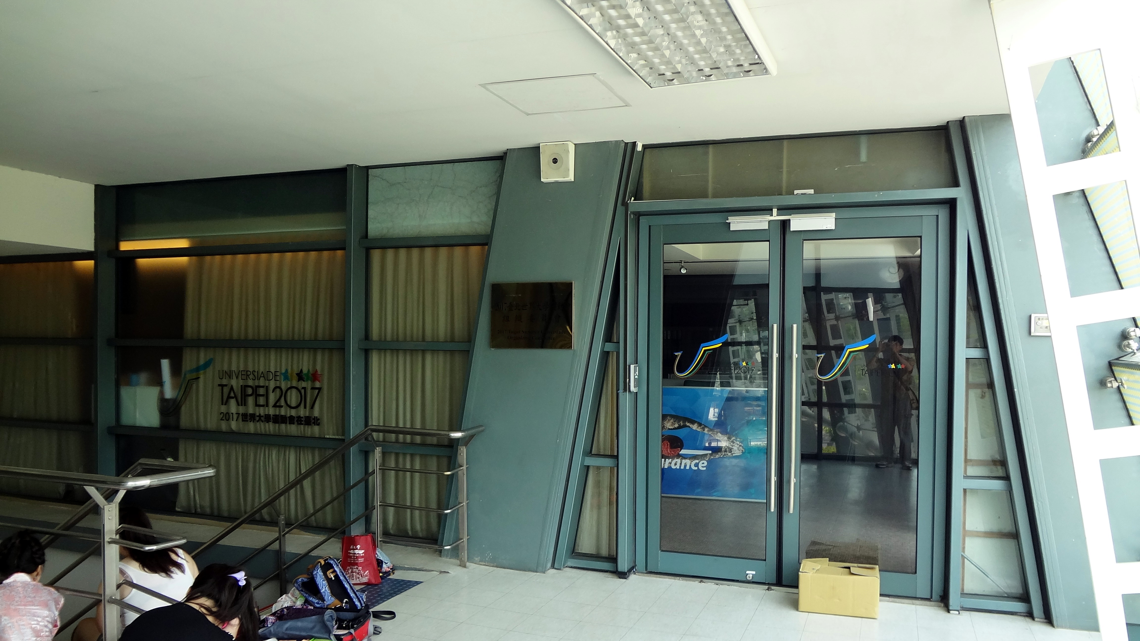 中文（台灣）: 2017臺北世界大學運動會組織委員會辦公室，位於臺北市松山區南京東路四段2號3樓（臺北小巨蛋星光廳上方）。